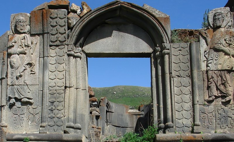 ruine du monastère